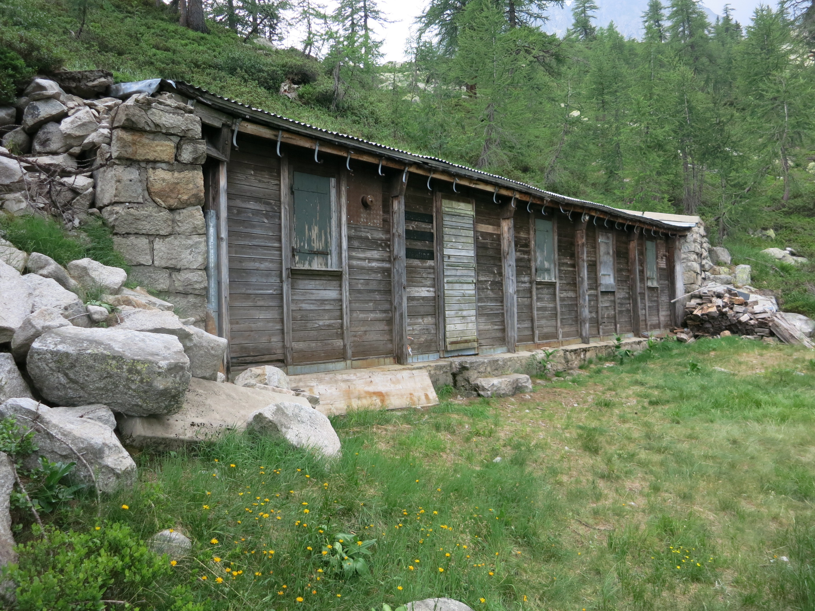 Militärbaracke, Piansecco, Bedretto TI, Schweiz